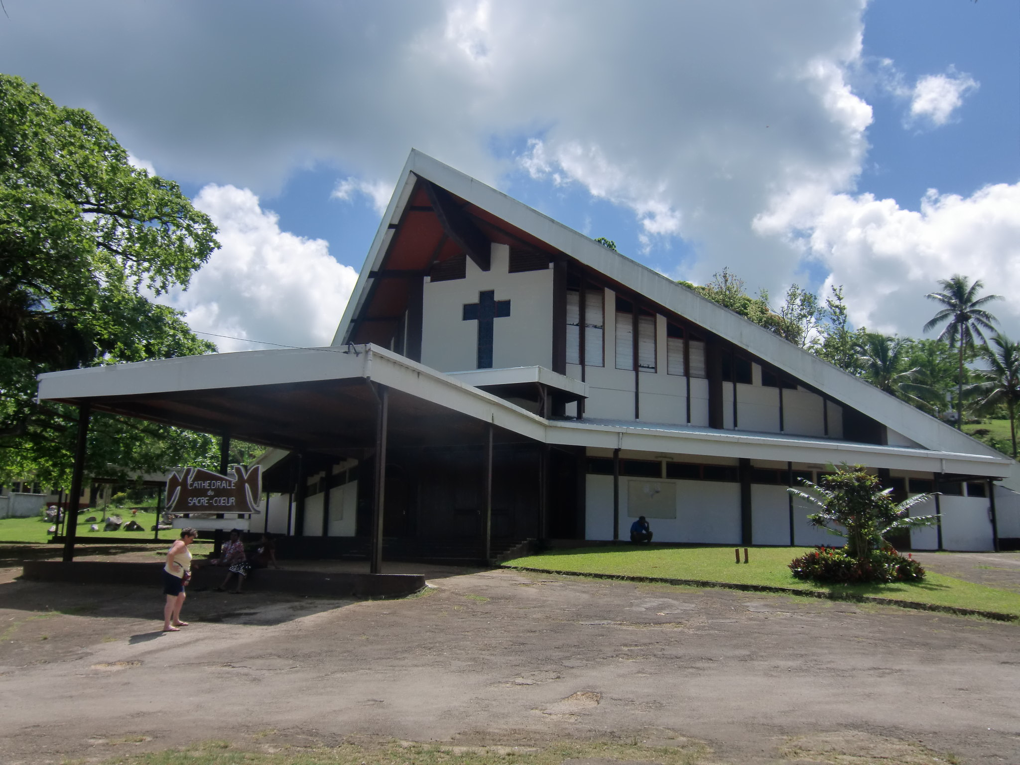 Cathédrale du Sacré-Coeur - Port-Vila (Vanuatu)